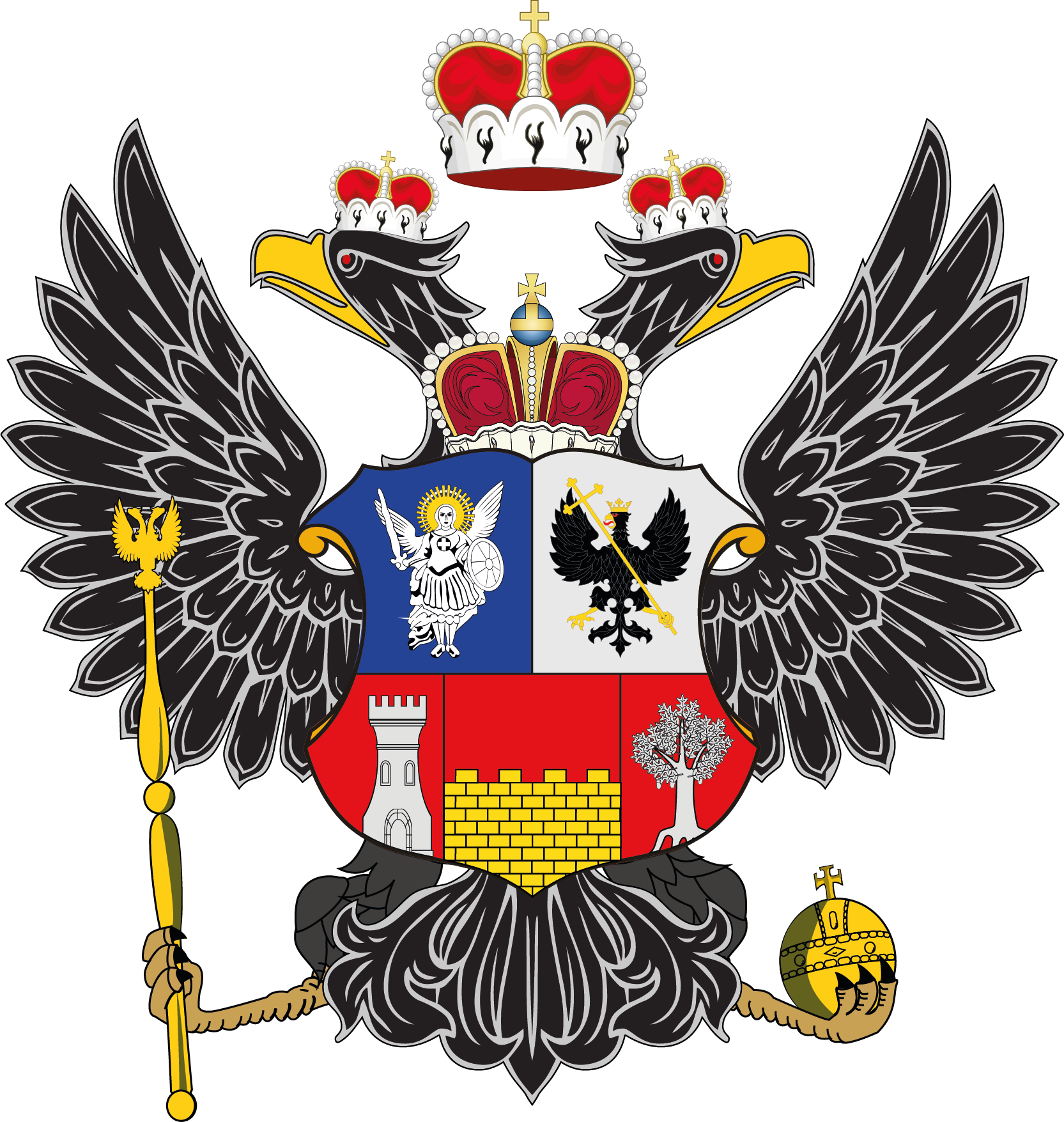 Малий герб Малої Росії (часів ІІ Малоросійської колегії)